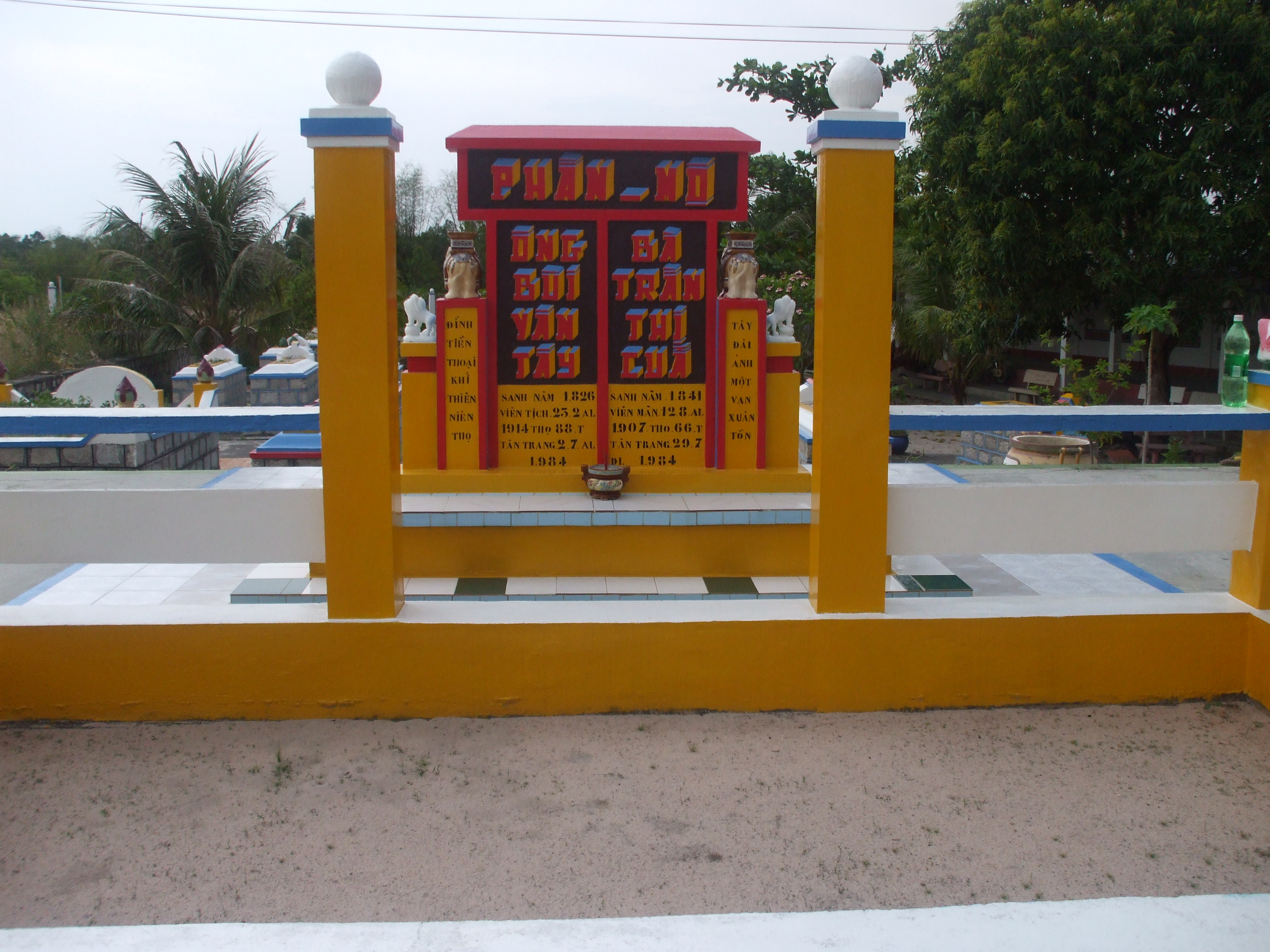 Mộ vợ chồng Đình Tây, ở xã Thới Sơn, huyện Tịnh Biên, An Giang.